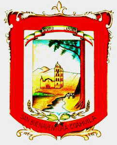 Escudo del municipio de San Buenaventura, Coahuila